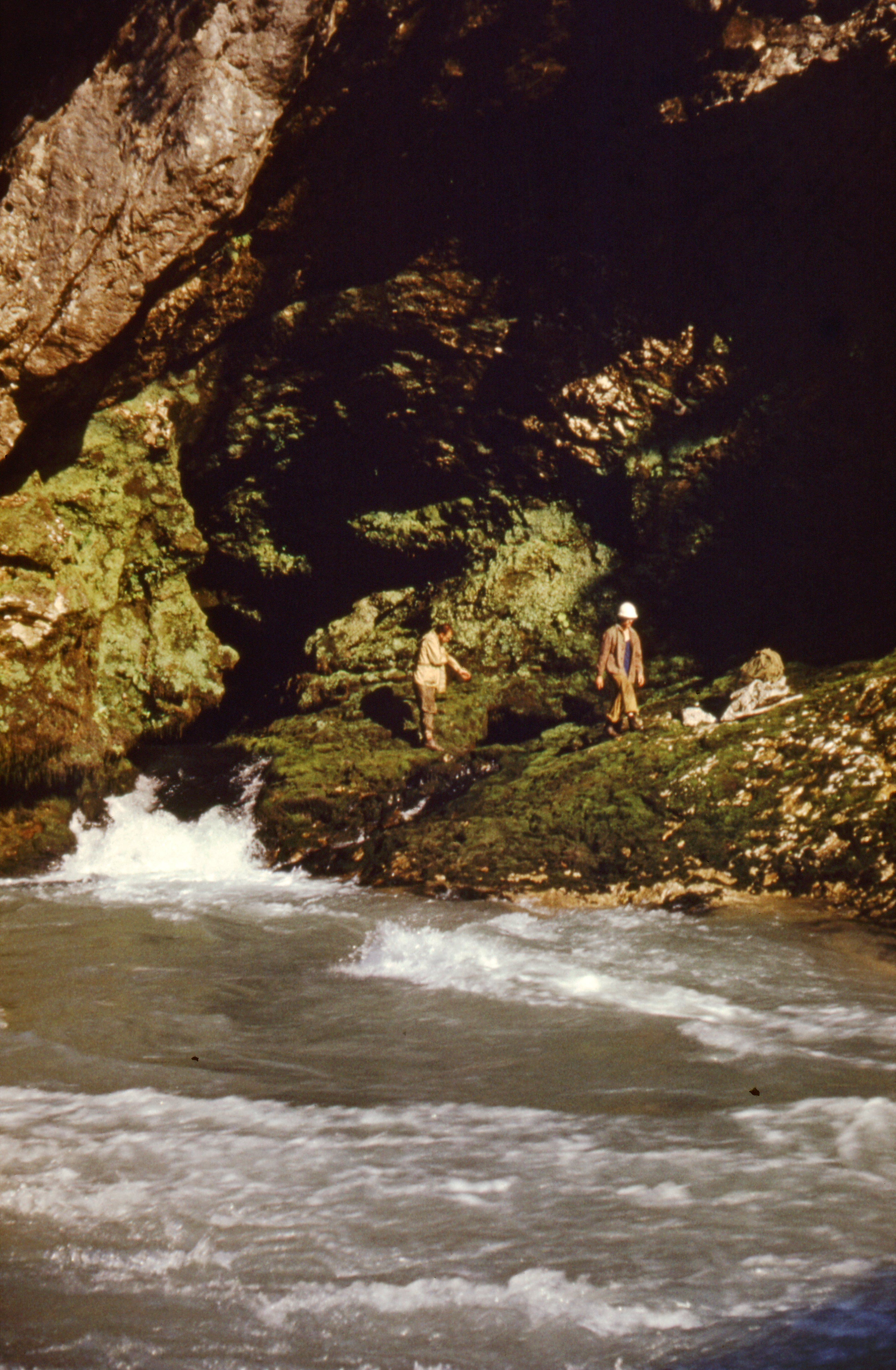 Абхазия. Северный Бзыбский воклюз